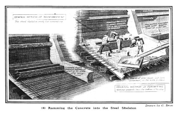 building of the world war one concret shipold dockyard illustration